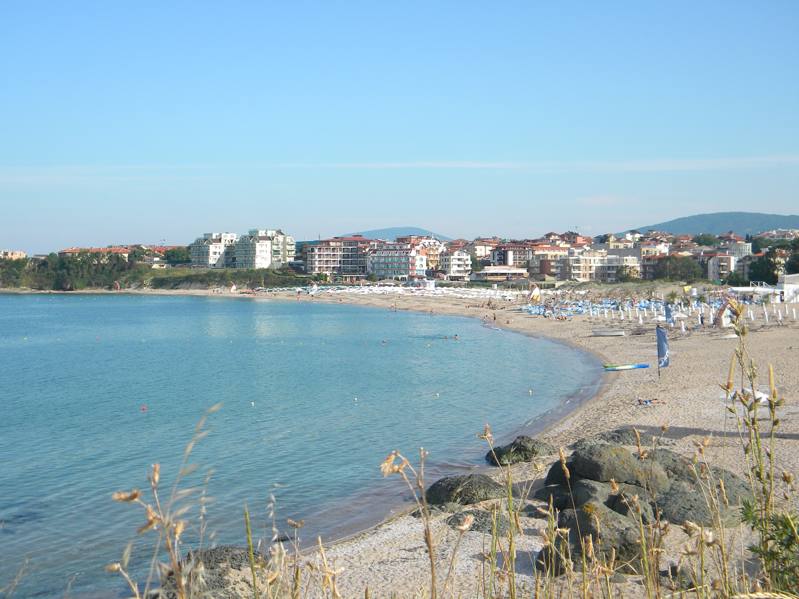 Общ план на Лозенец от север